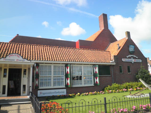 Het Volendammer Museum met daarbinnen het Sigarenbandjes Huisje.